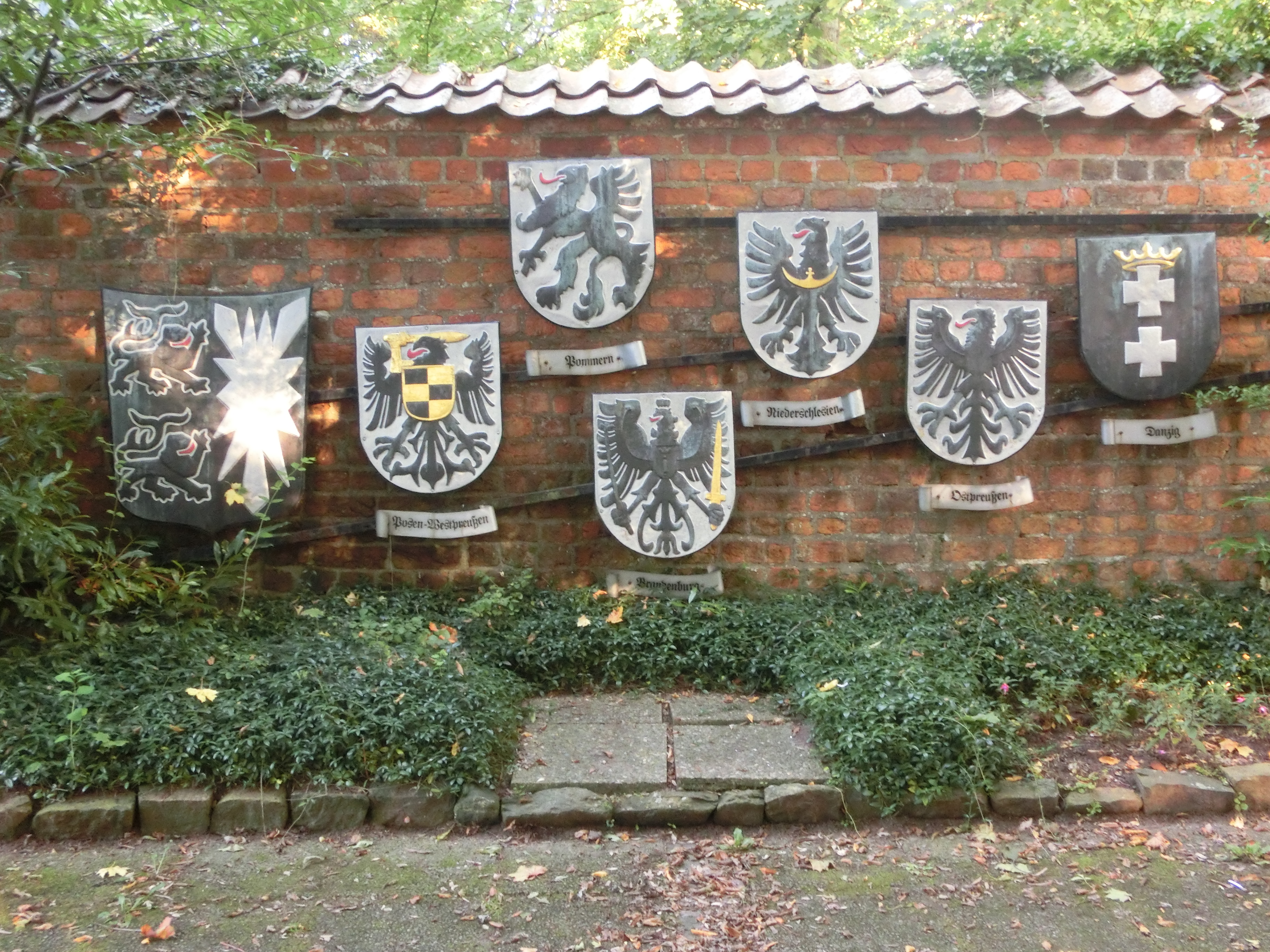 Gedenkmauer bei der Klosterkirche Bordesholm mit den Wappen Schleswig-Holsteins und der ostdeutschen Provinzen